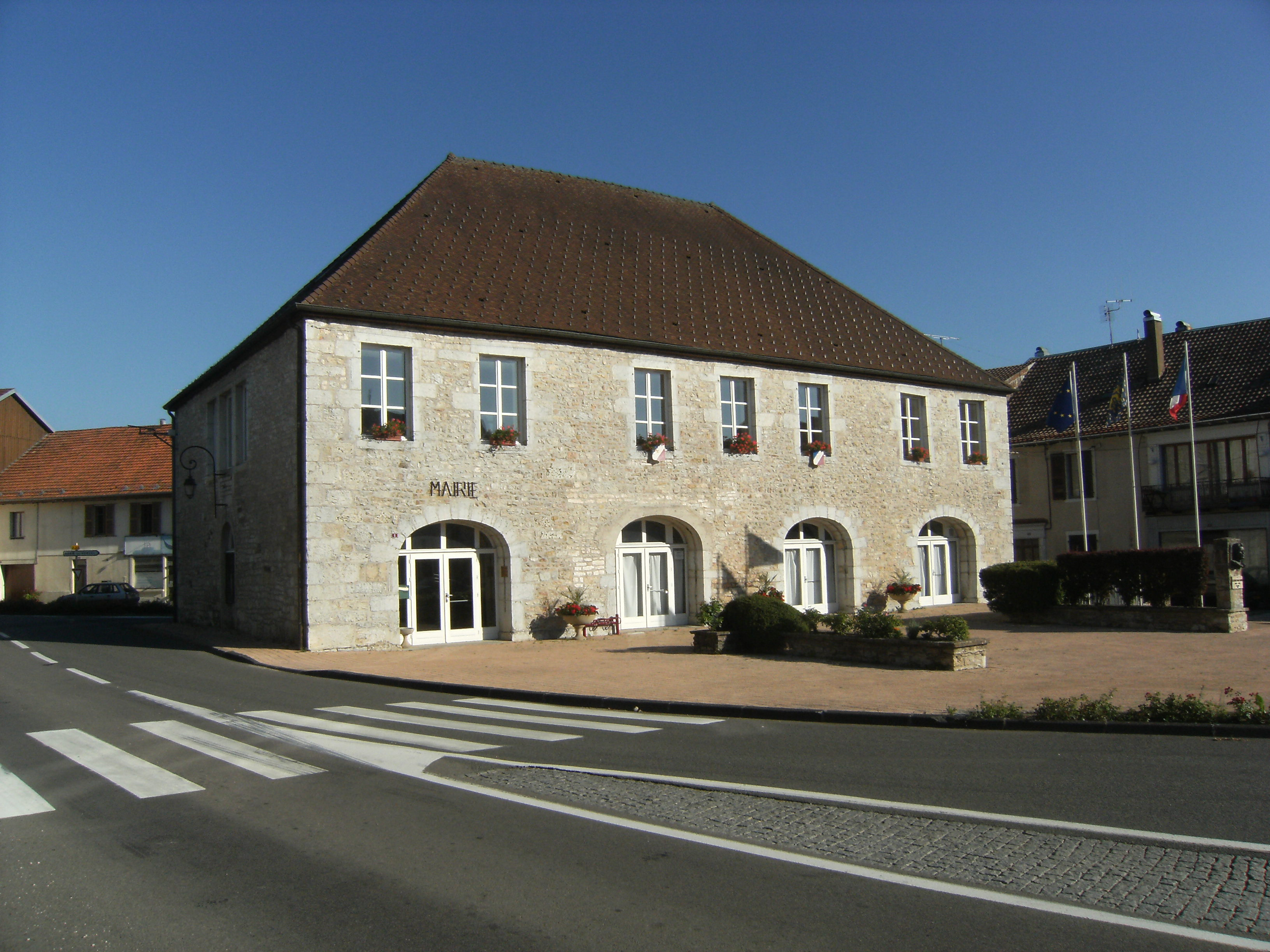 Mairie de Vercel Villedieu le Camp (France - 25)